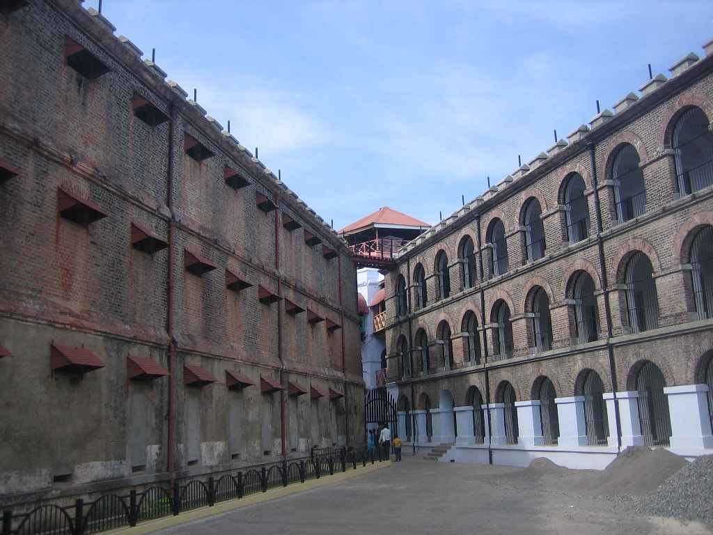 പോർട്ട്ബ്ലയറിലെ സെല്ലുലാർ ജയിൽ - വാച്ച് ടവറും ജയിലിന്റെ രണ്ടു വിംഗുകളും